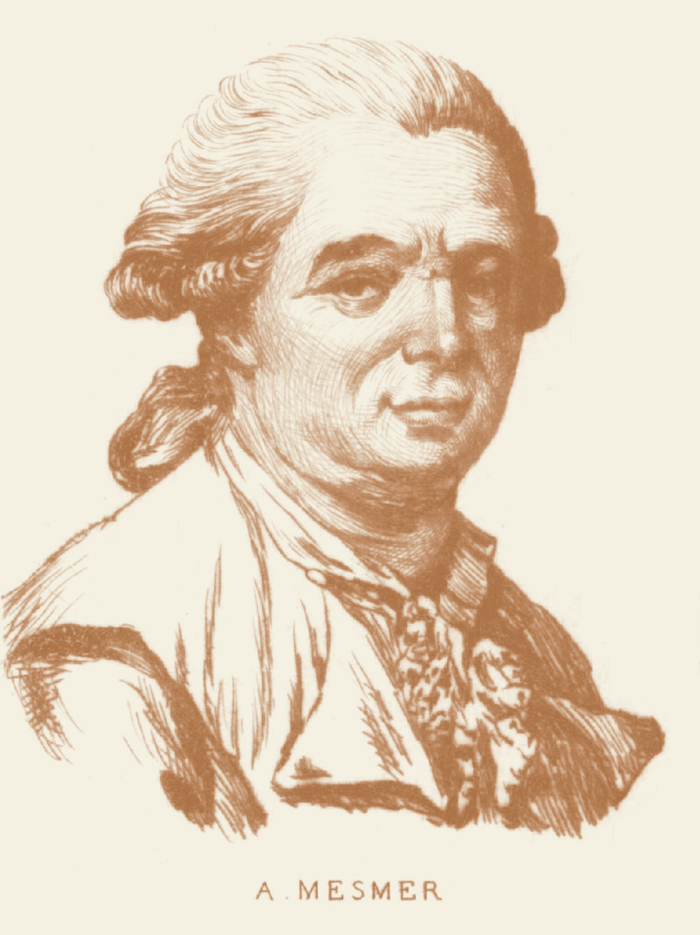 Franz Anton Mesmer